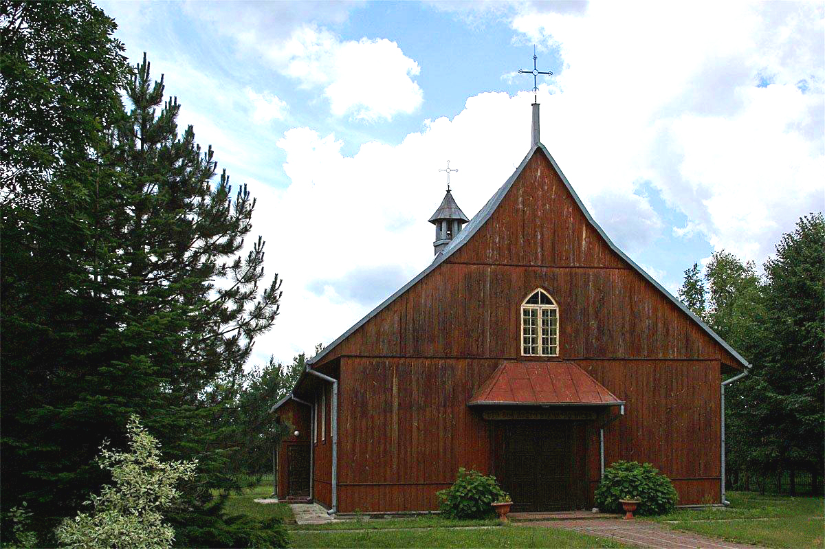 Kaplica w Sobiborze